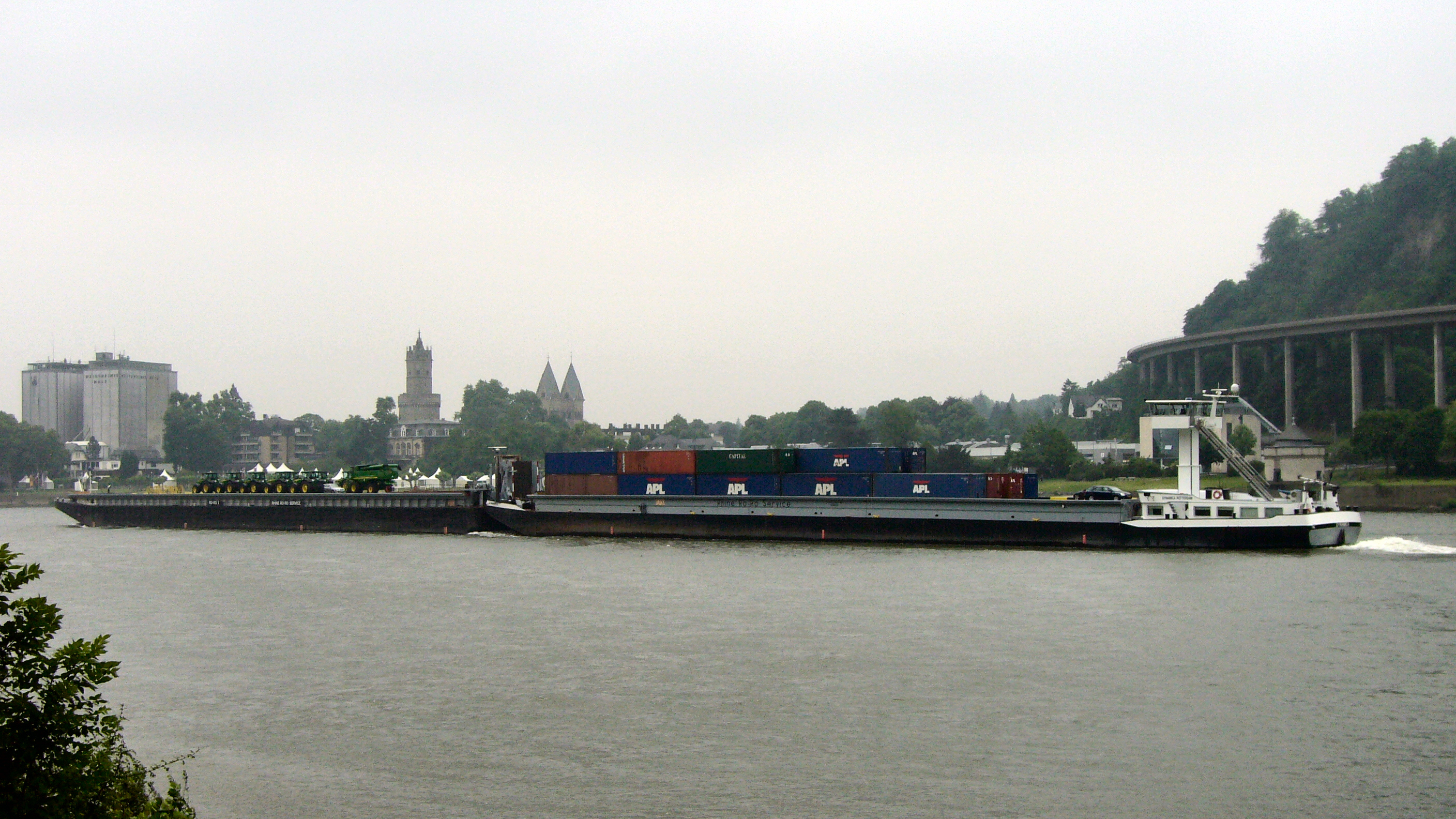 Ro-Ro Koppelverband